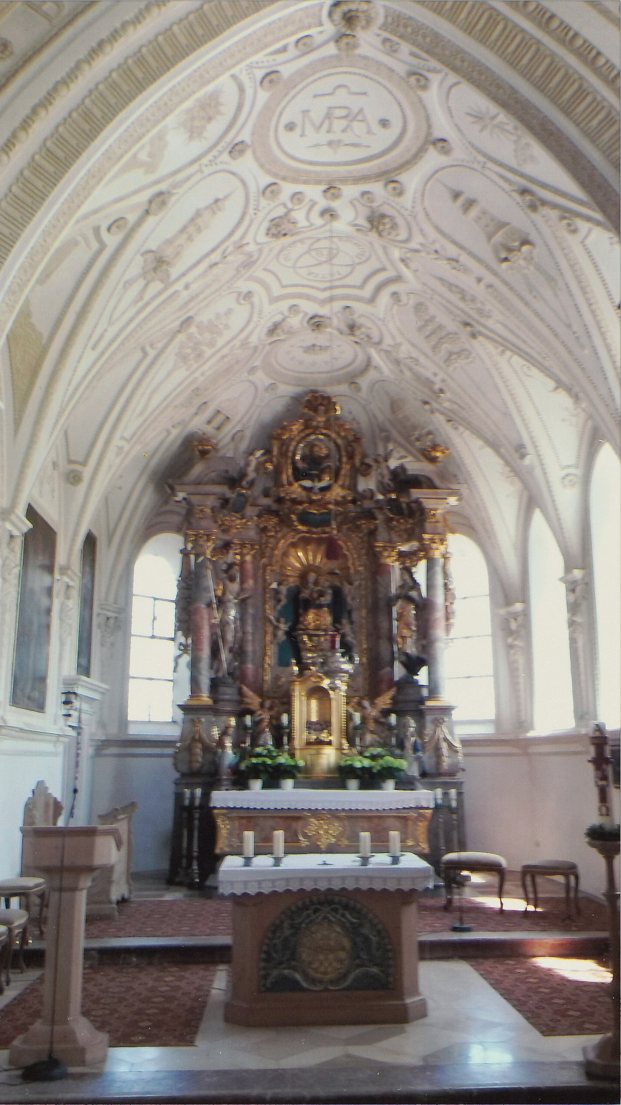 Feldkirchen (Rott am Inn), Filialkirche Unsere Liebe Frau, Chor mit dem frühbarocken Stuck von 1630 und spätbarocken Hochaltar (1700).